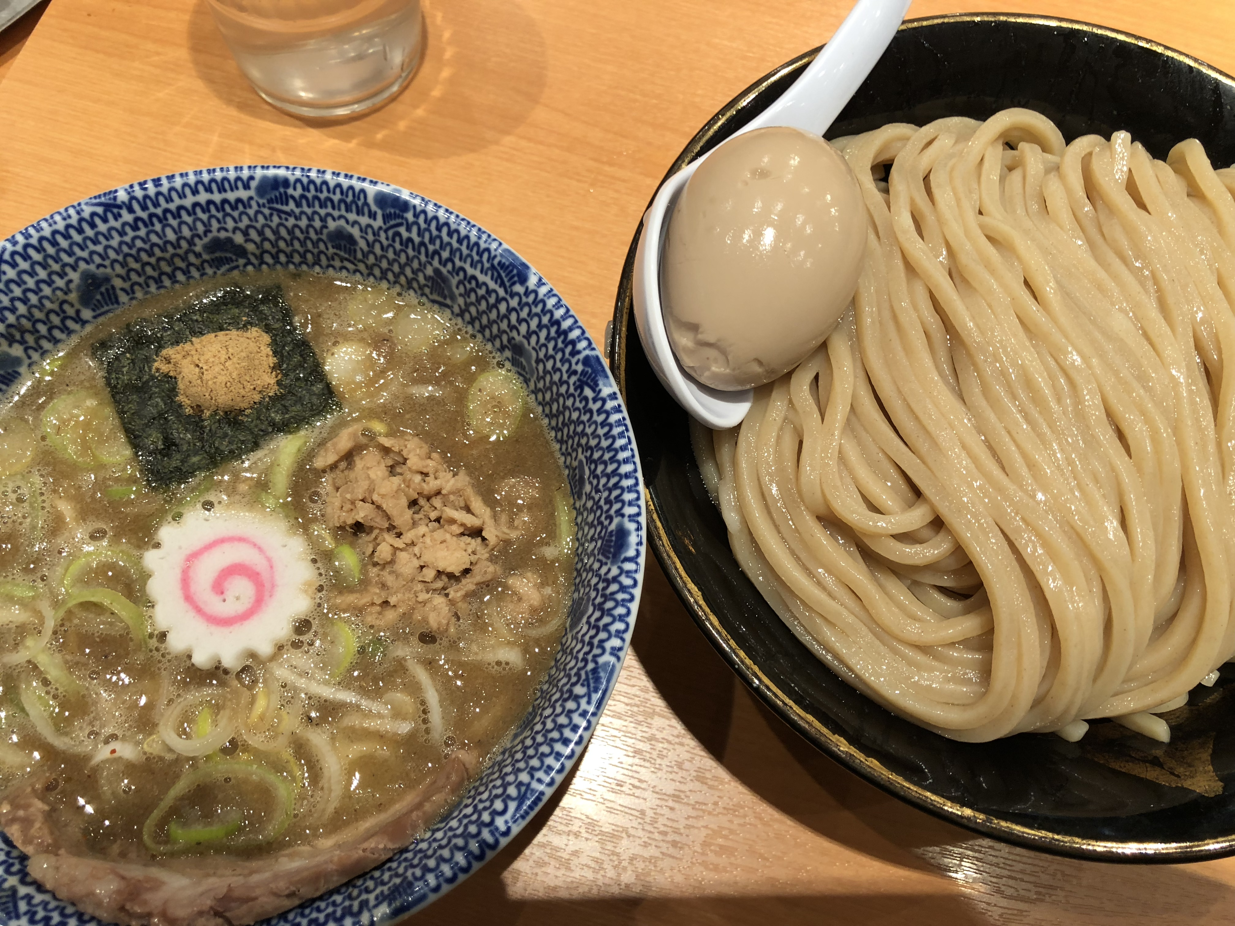 六厘舎のja:つけ麺。東京ラーメンストリートにて。